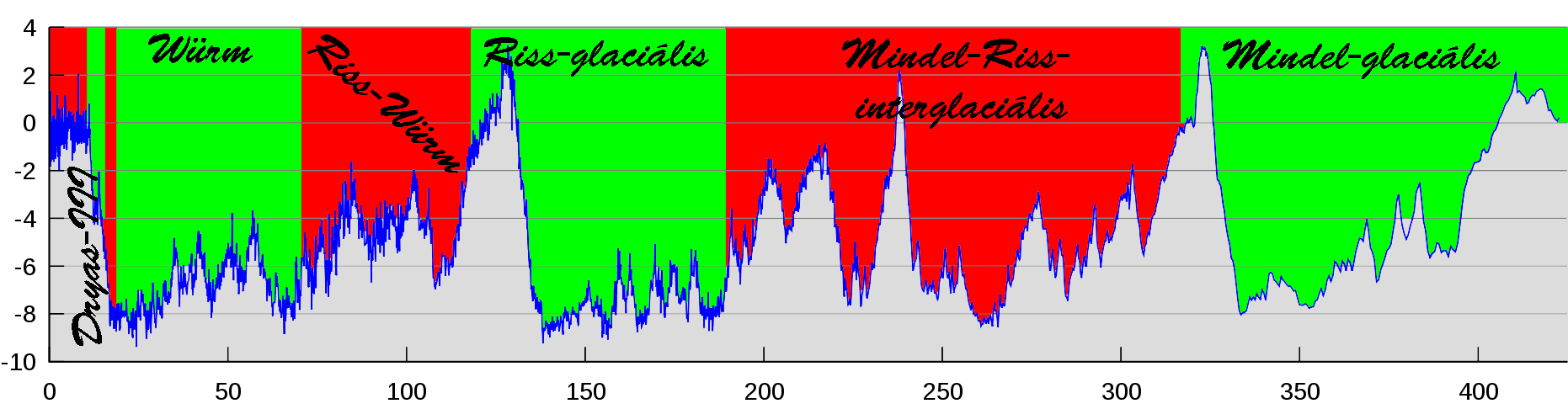 A Vosztok-jégfúrás adataiból számított antarktiszi hőmérséklet az utóbbi 400 000 évben